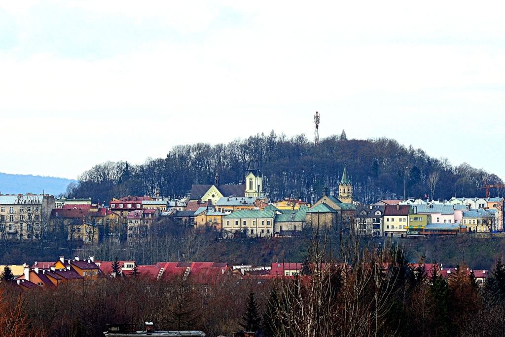 Wachhügel (polnisch Stróżnia), heute Sanoker Stadtpark bei der Mickiewicz-Straße. Den Blick nach Westen, Sanok 2013